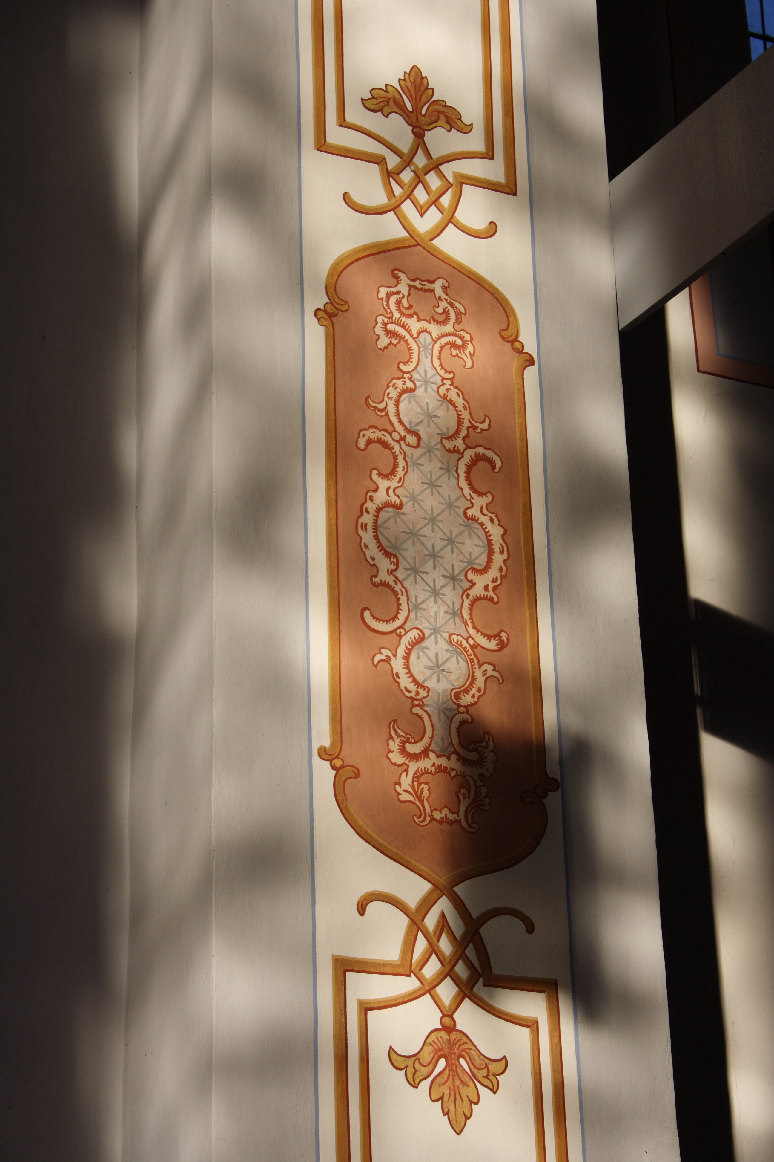 Katholische Pfarrkirche St. Josef, ehemalige Karmeliterkirche in Beilstein im Landkreis Cochem-Zell (Rheinland-Pfalz), Dekor am Chorbogen